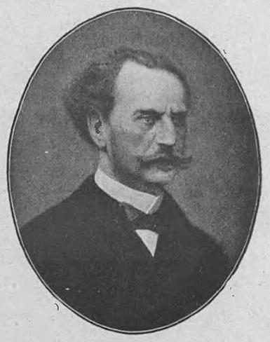 Adam Józef Potocki